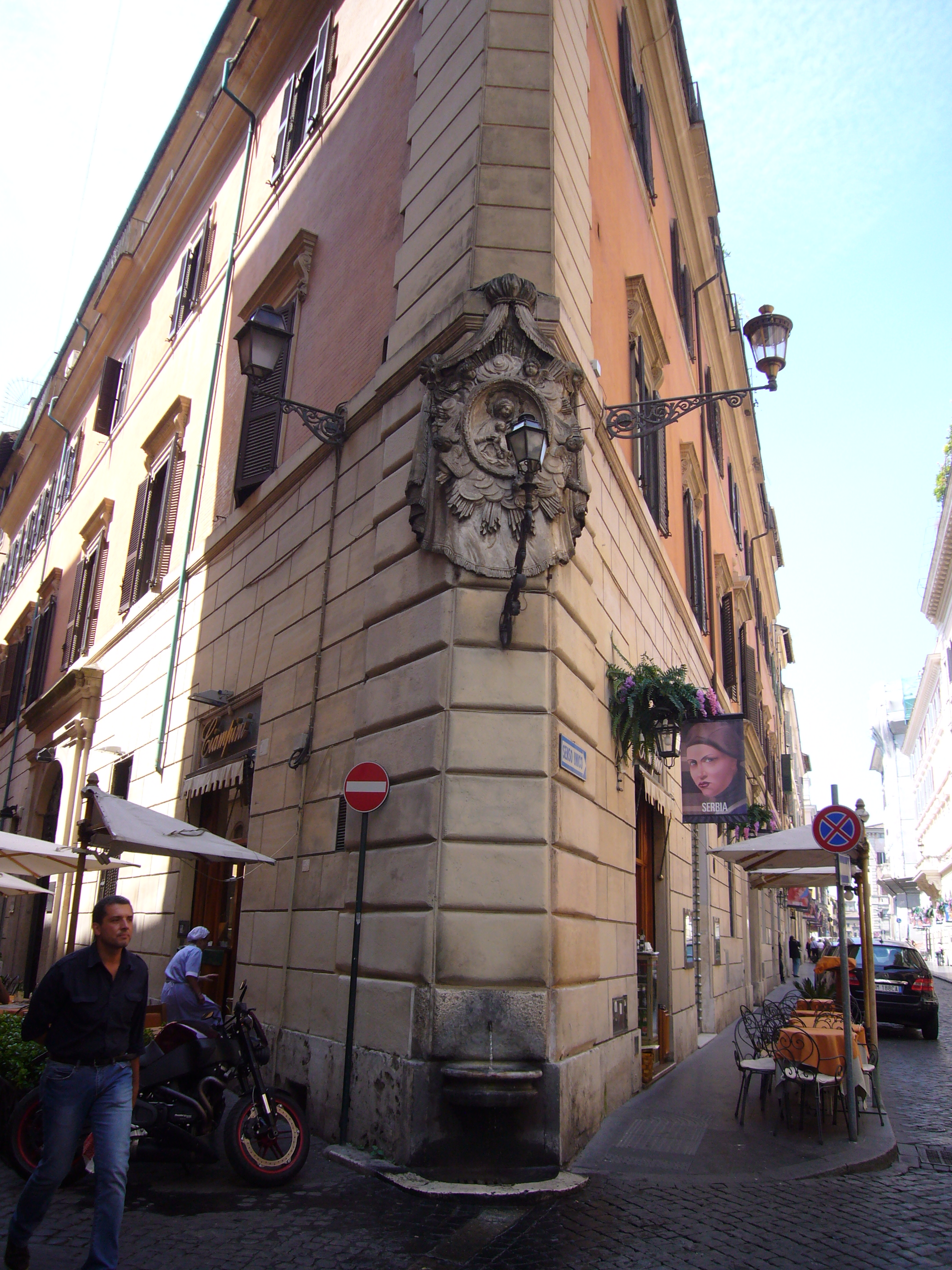 Roma, madonna e fontanella sull'angolo del palazzo Sermattei-Della Genga